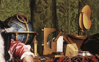 Détail de l'étagère inférieure du tableau Les Ambassadeurs